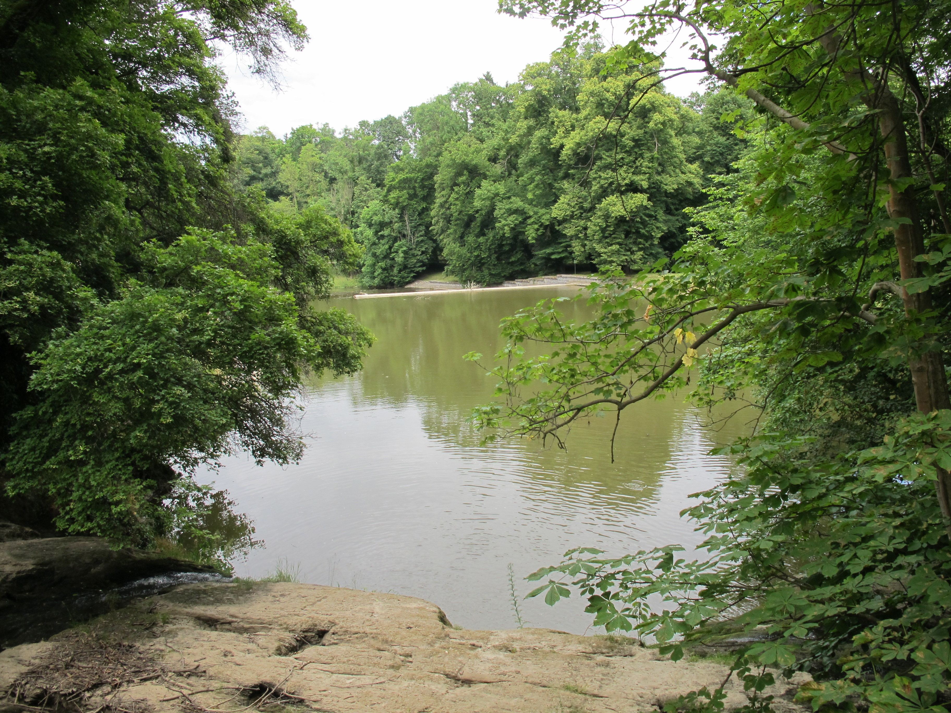 Zámecký park Žleby